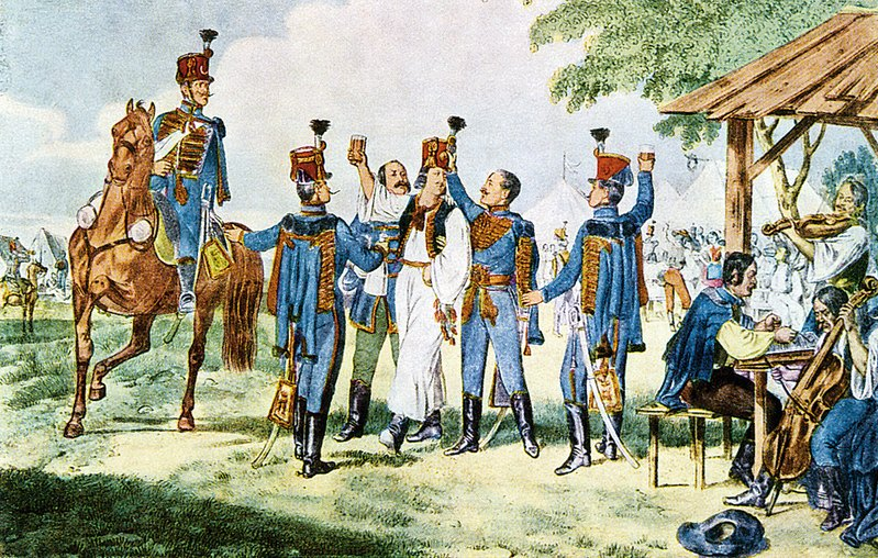 Verbunkos jelenet